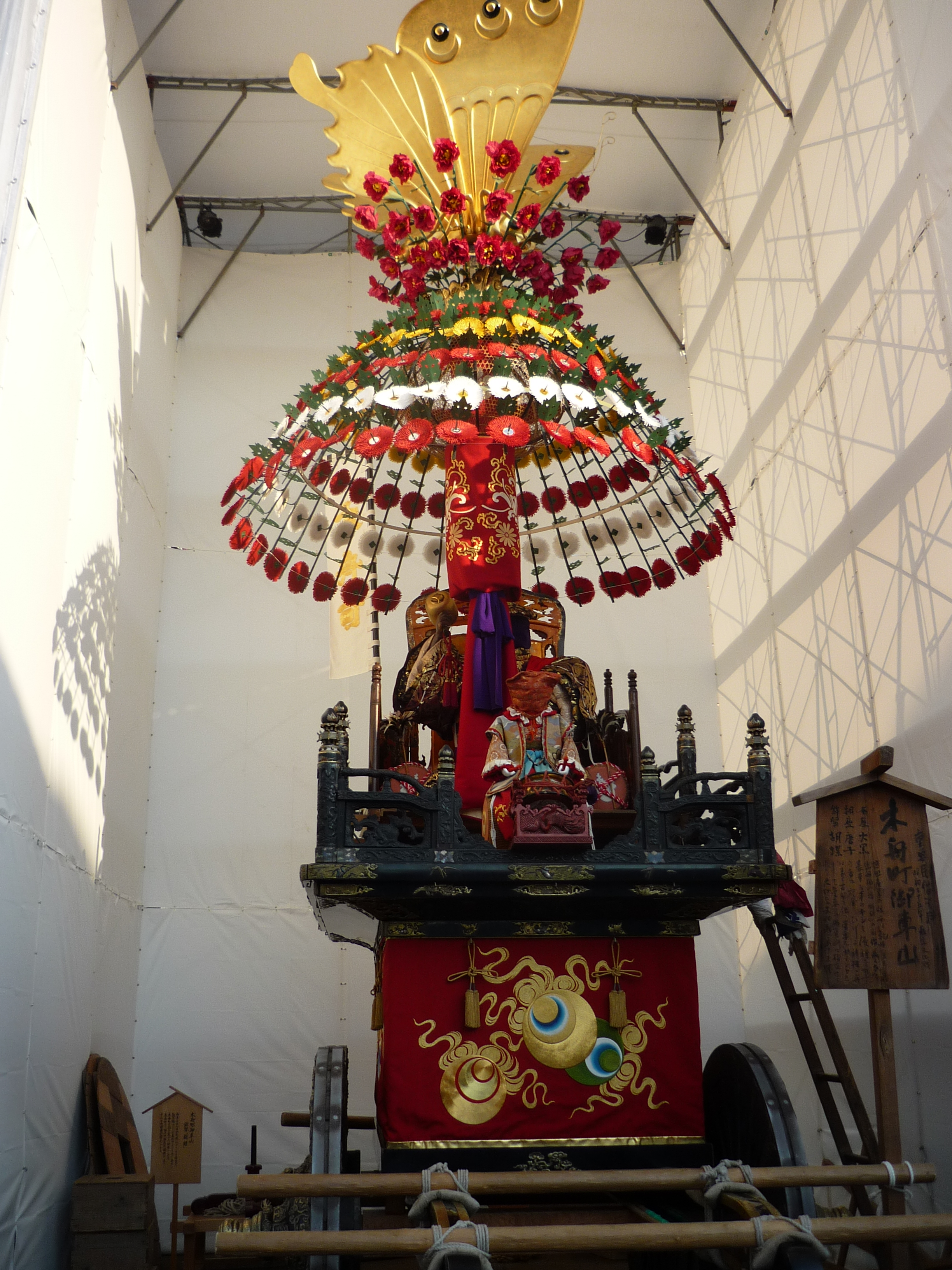 高岡市の御車山（木舟町）（2015年4月）